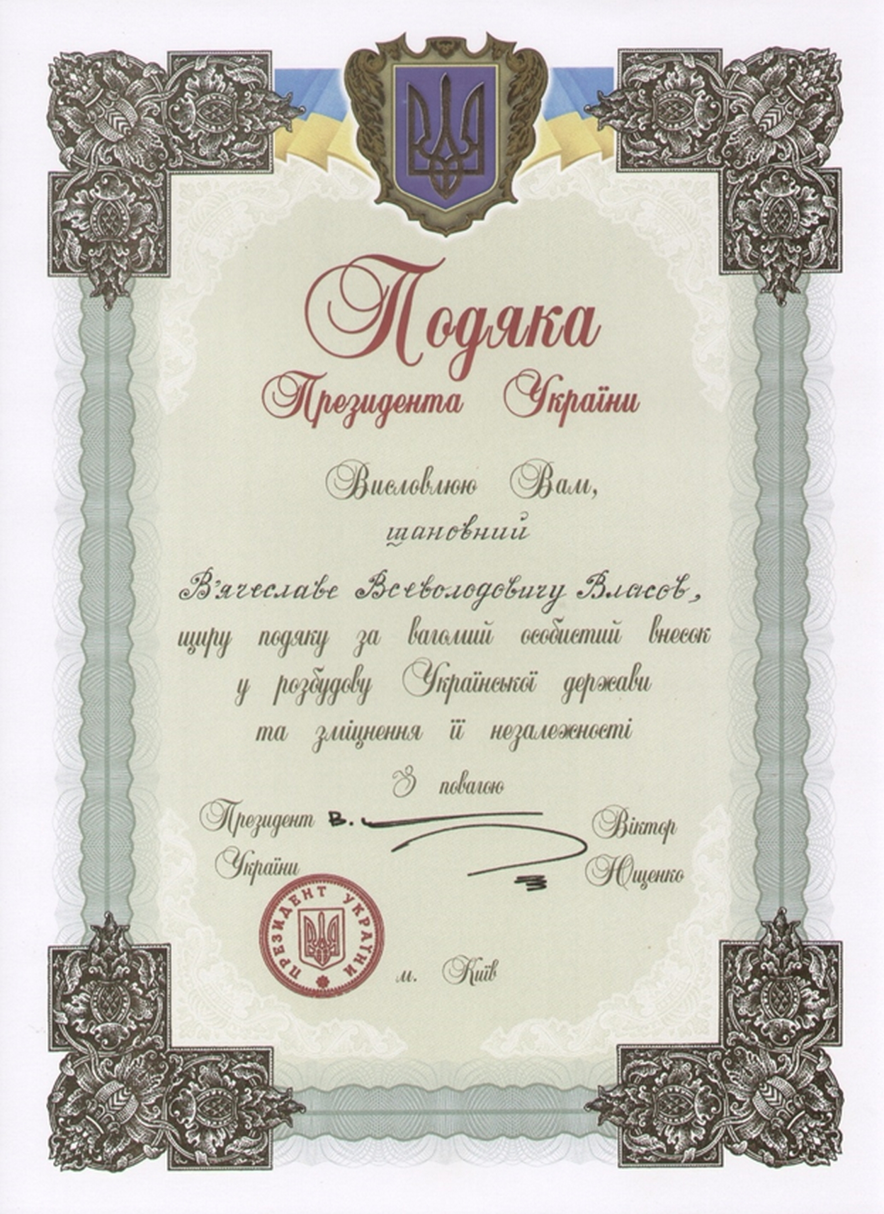 Благодарность президента Украины Власову Вячеславу